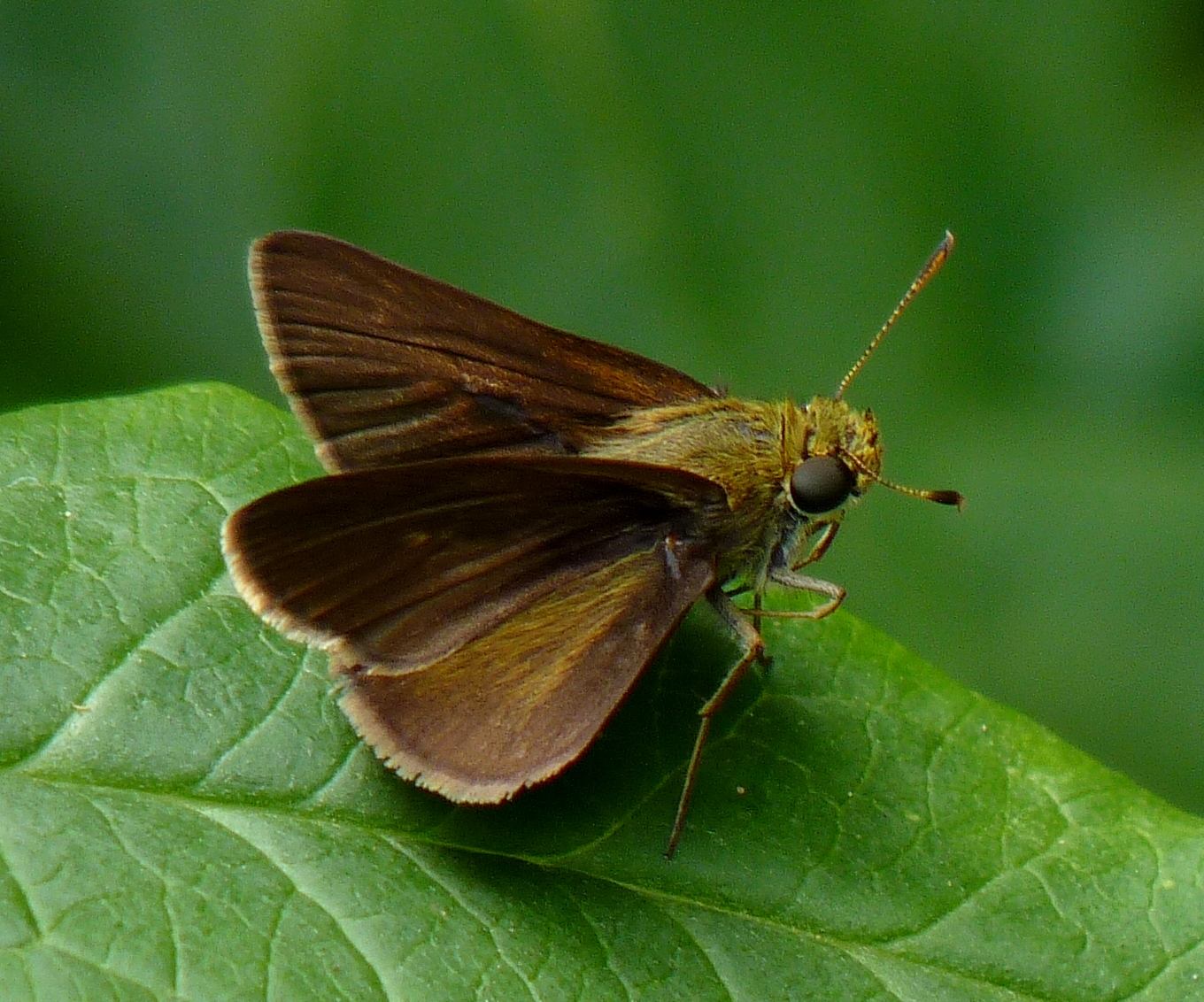 Dun Skipper (Euphyes vestris).